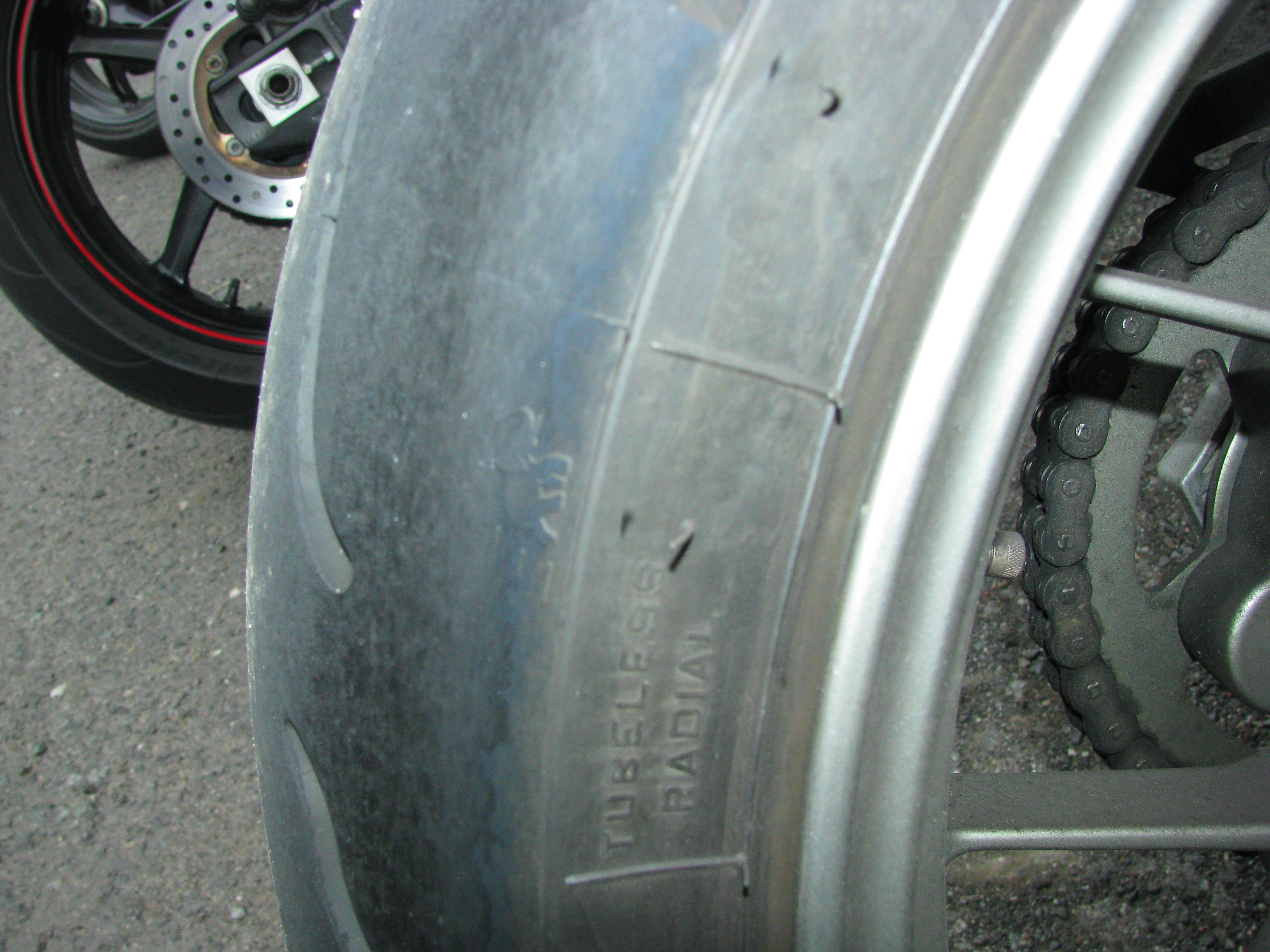 Angststreifen auf einem Metzeler Hinterrad-Reifen inklusive Elefantenlogo auf der Lauffläche.